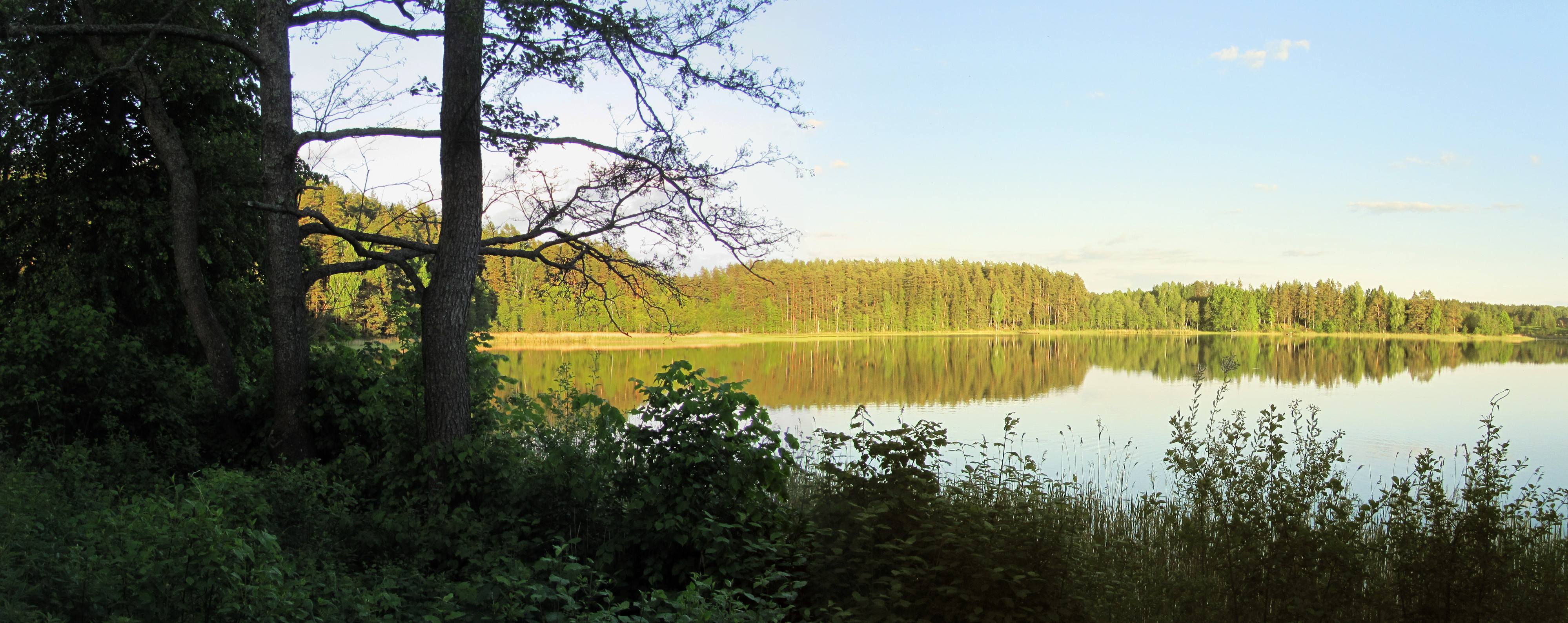 178, 32316, Lithuania